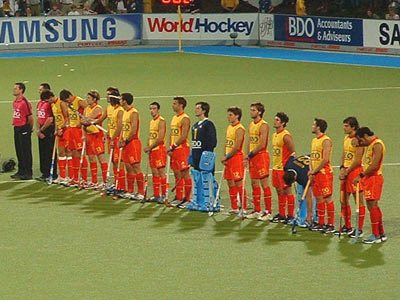 Spanische Herren-Hockeynationalmannschaft beim Halbfinale der WM 2006 gegen Deutschland